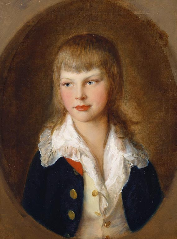 Portrait du prince Auguste